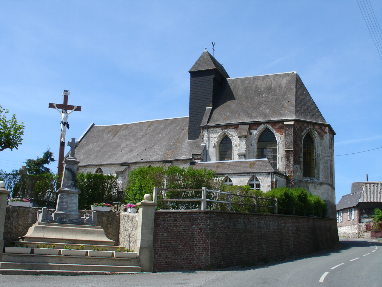 Église d'Ergny